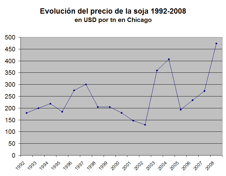 Aumento del precio internacional de la soja. Período 1992-2008. En este último año se toma el precio más alto hasta mayo. En dólares por tonelada.